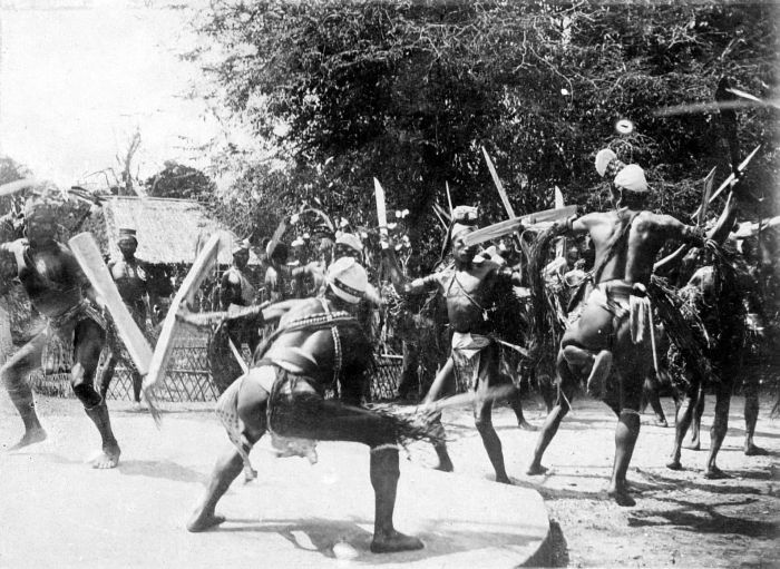 Repronegatief. Honitetoe-Alfoeren voeren de 'Tjakalélé' krijgsdans op, Seram